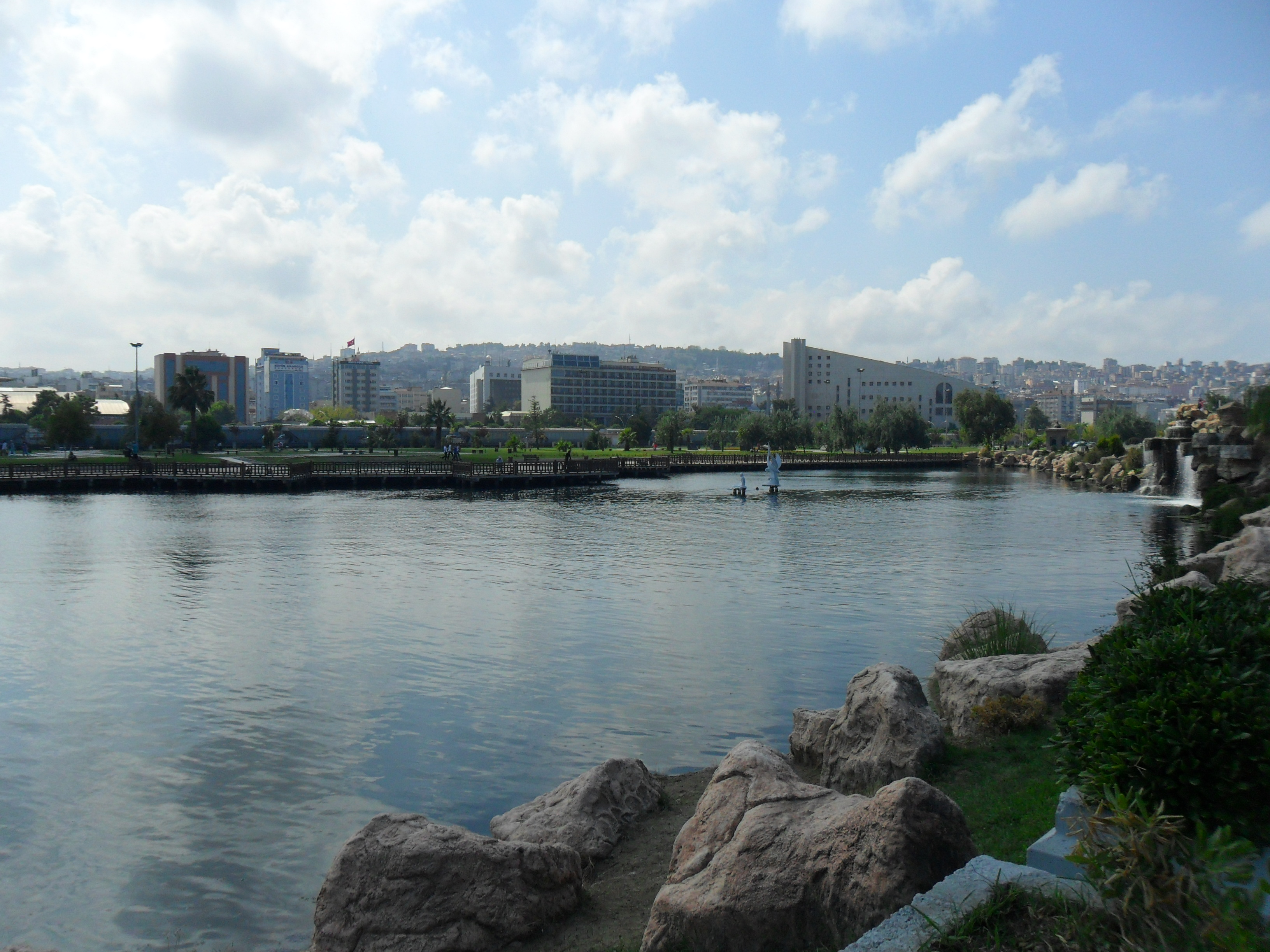 Kurtuluş İskelesi'nin karşısında yer alan yapay göl.